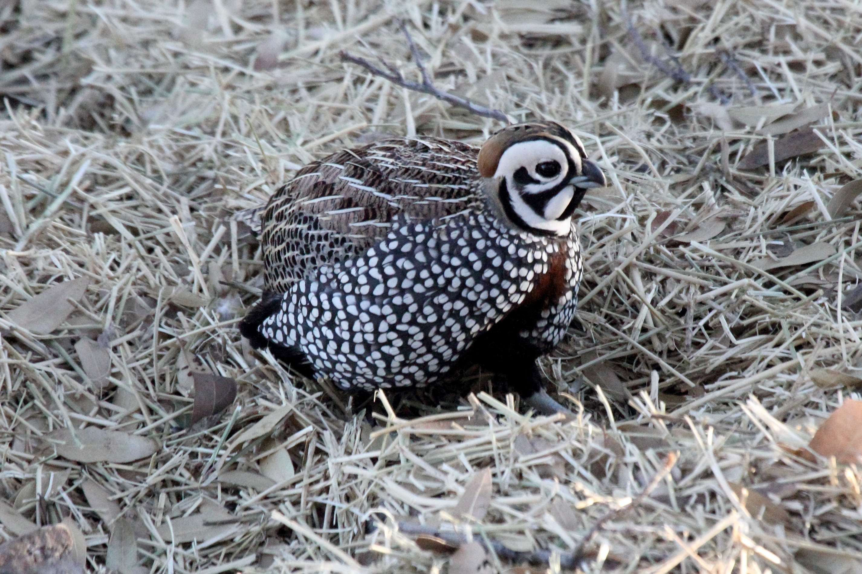 male